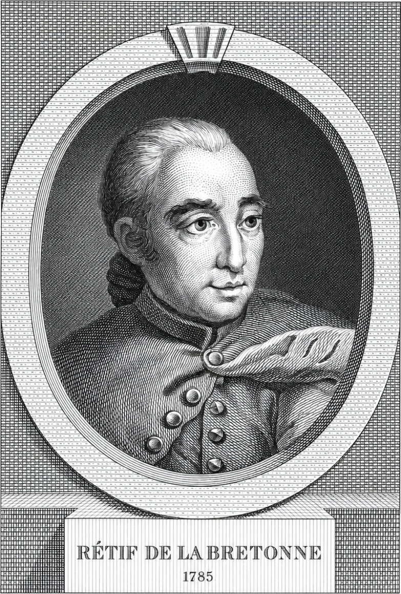 Portrait (1785) of Nicolas-Edme Rétif (1734-1806)